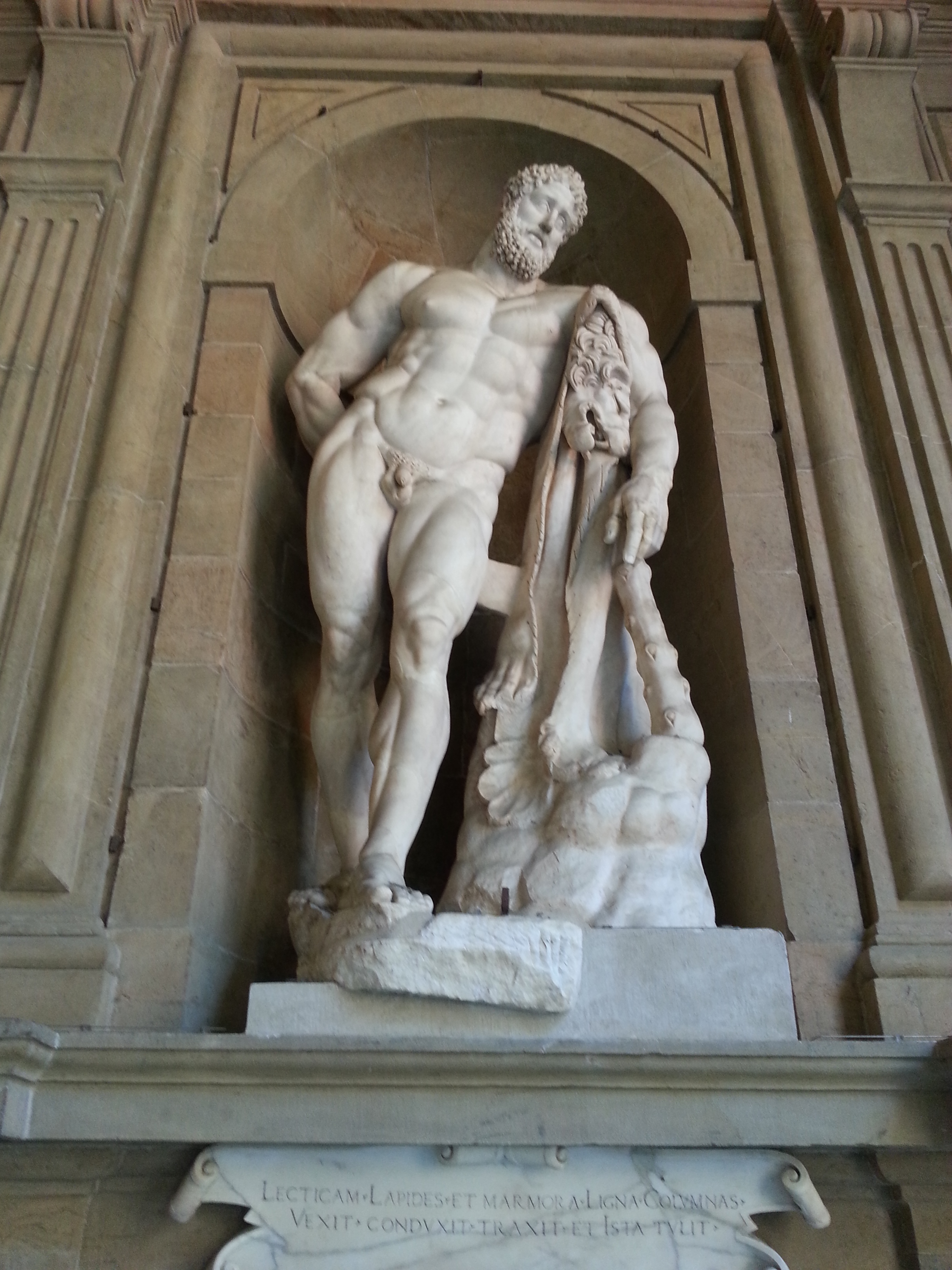 Ercole